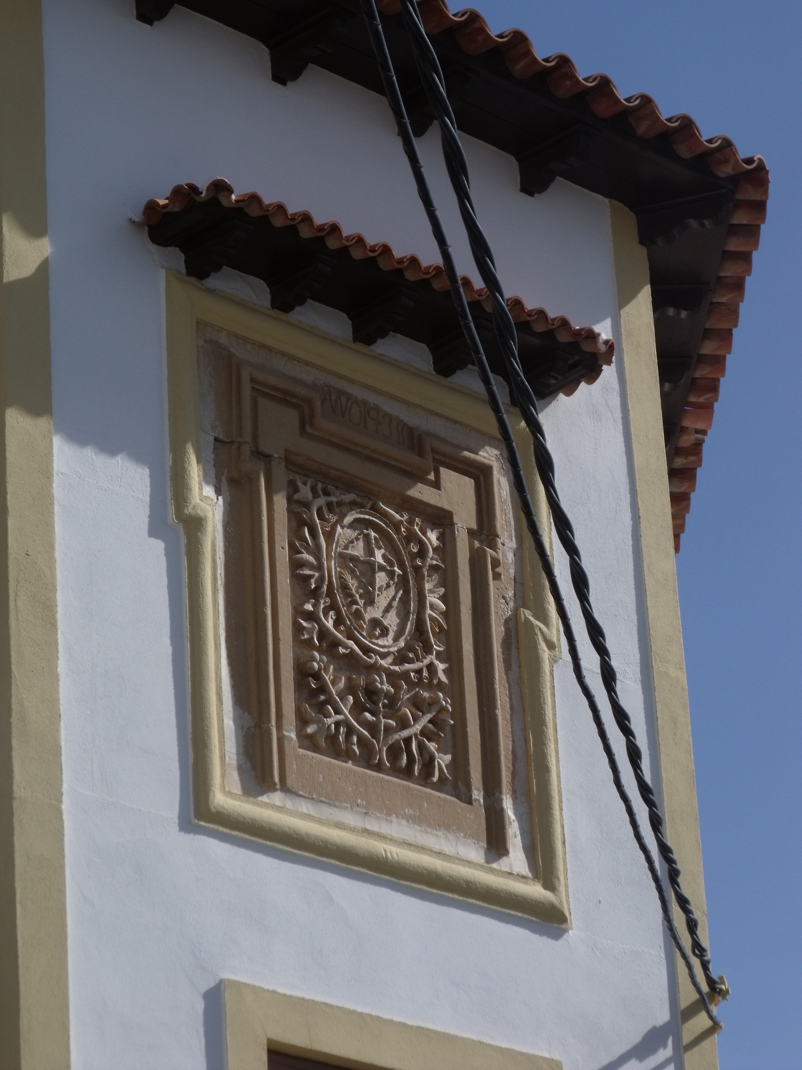 Escudo de la Inquisición en Mota del Cuervo.